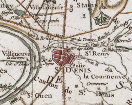 Saint-Denis (France) - Carte de Cassini, vers 1780